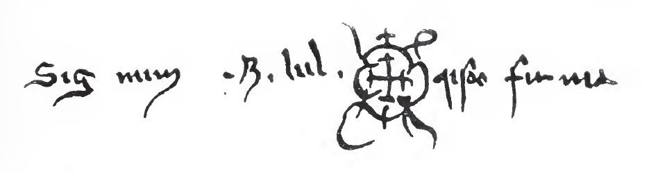 Autógrafo de Ramón Llull, una firma hecha en Barcelona el 16 de junio de 1256 ante notario. Dice: Signum - R. lul. † qisoc firma. En el documento, Lullus declara que su padre Ramón ya ha muerto anteriormente.